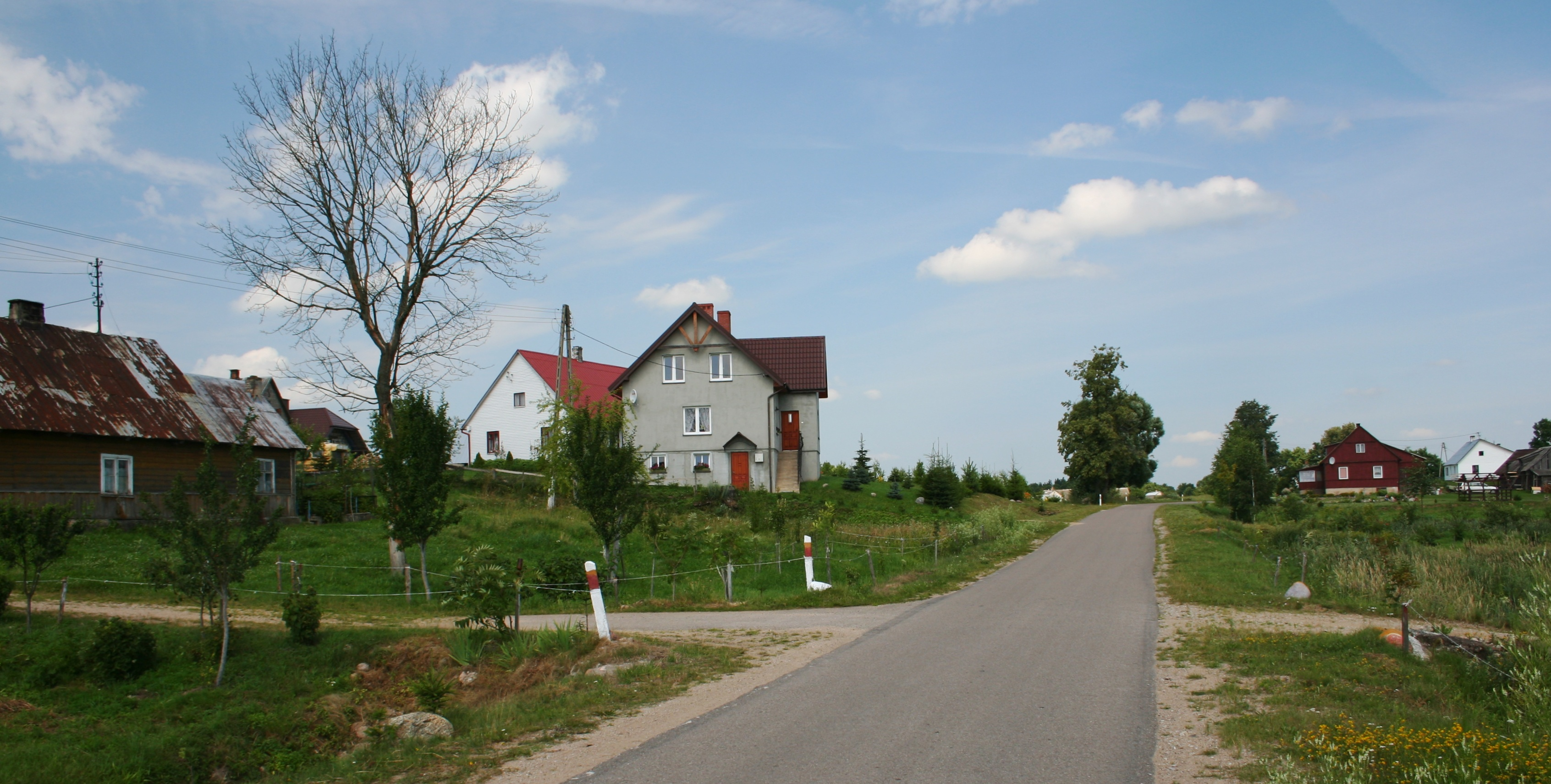 fragment miejscowości Białowierśnie, gmina Giby, woj. podlaskie